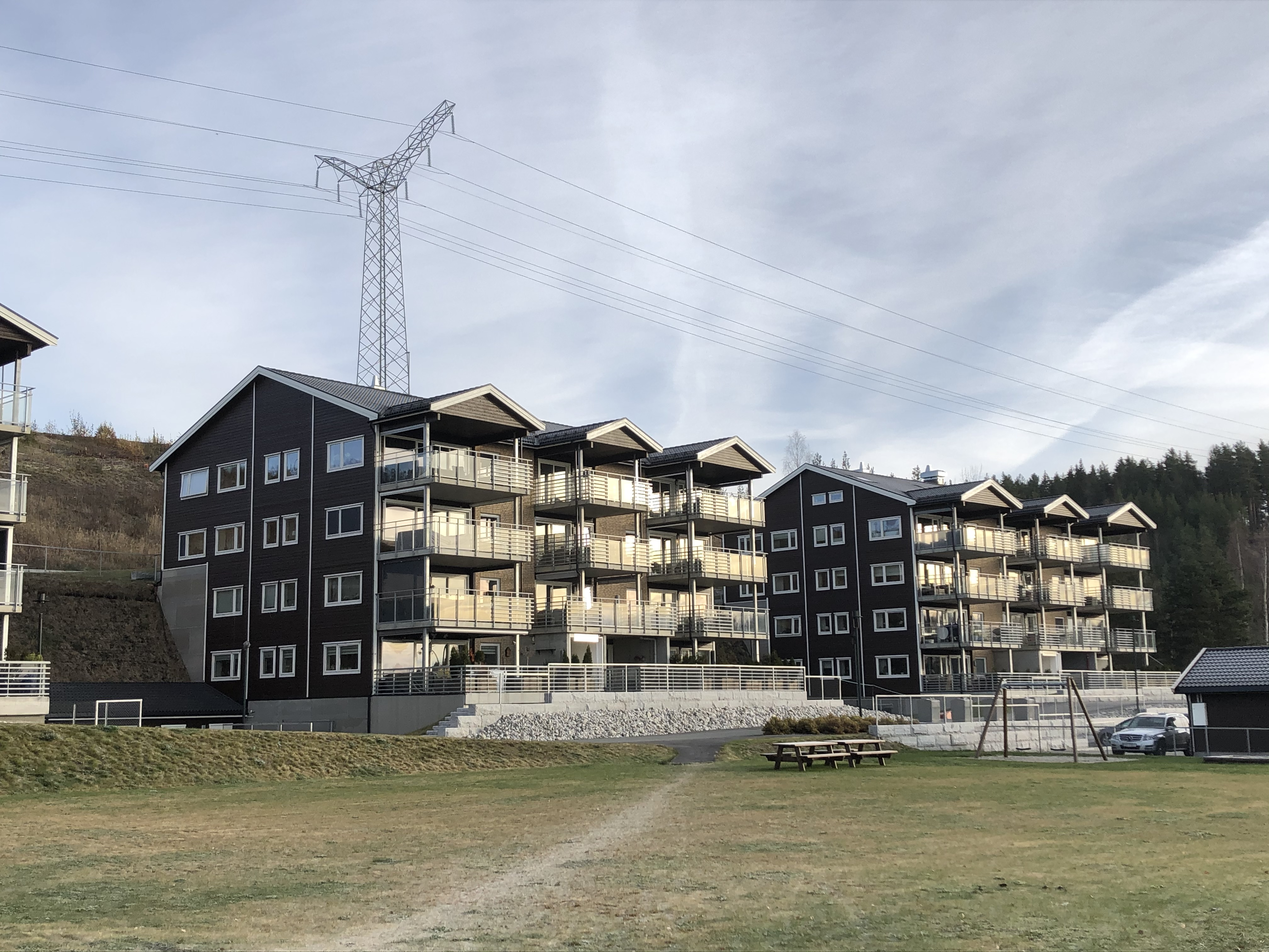 Konglefaret 33 og 31, Hønefoss